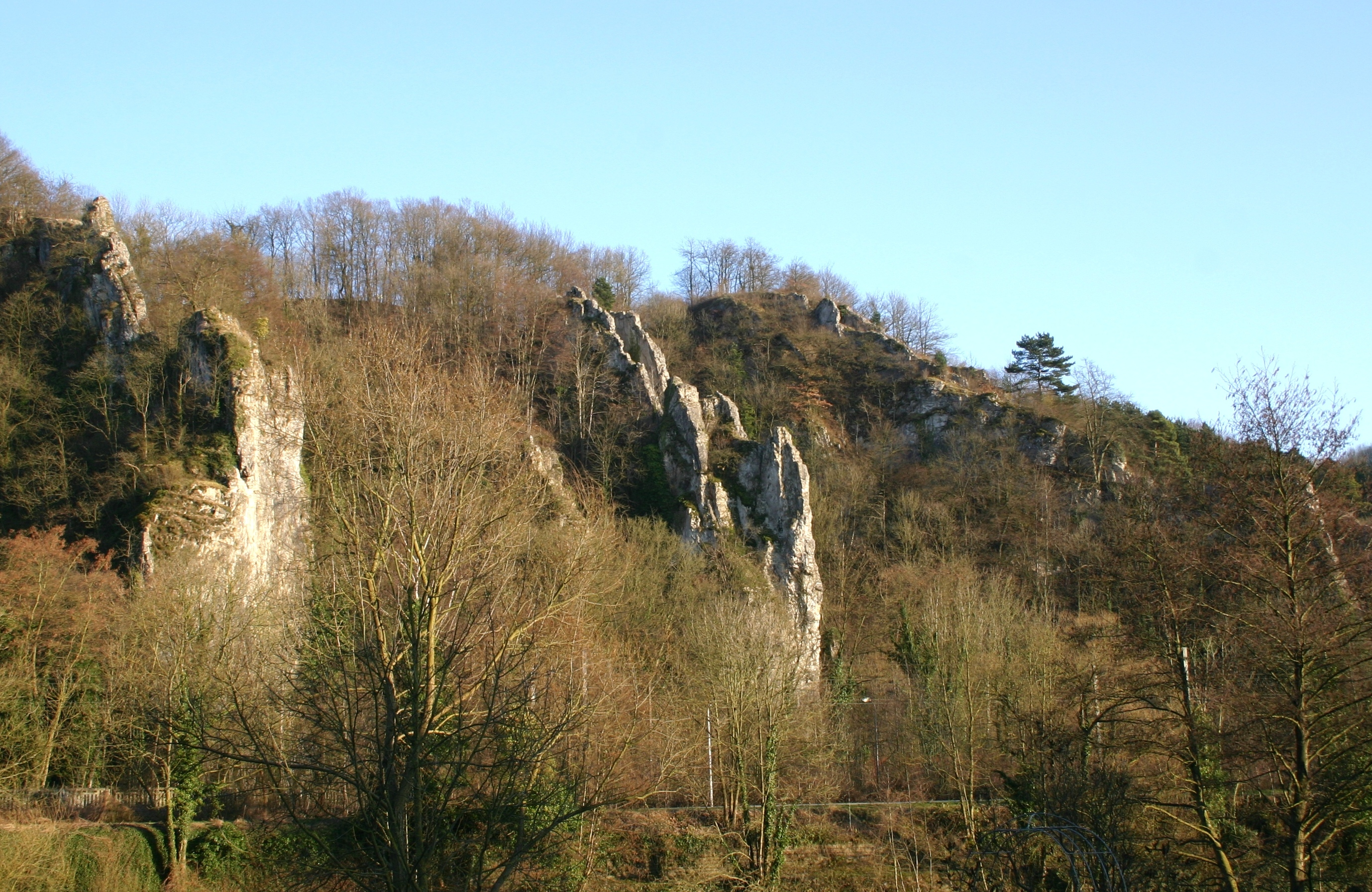 Les Tartines vun der Nationalstrooss aus gesinn.